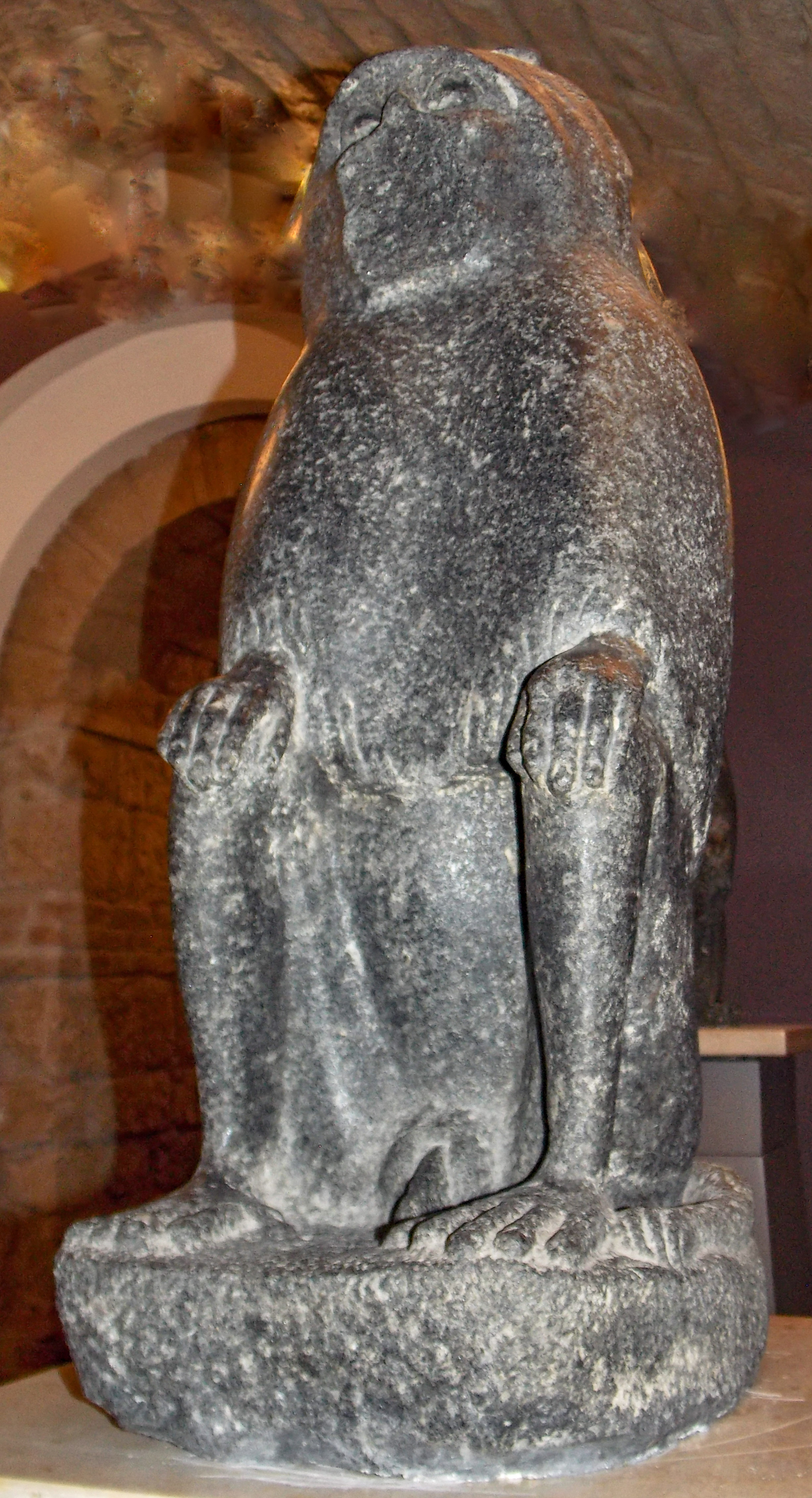 Un reperto del tempio di Iside di Benevento conservato nella sezione egizia del Museo del Sannio, presso il museo ARCOS. Thot in figura di babbuino.